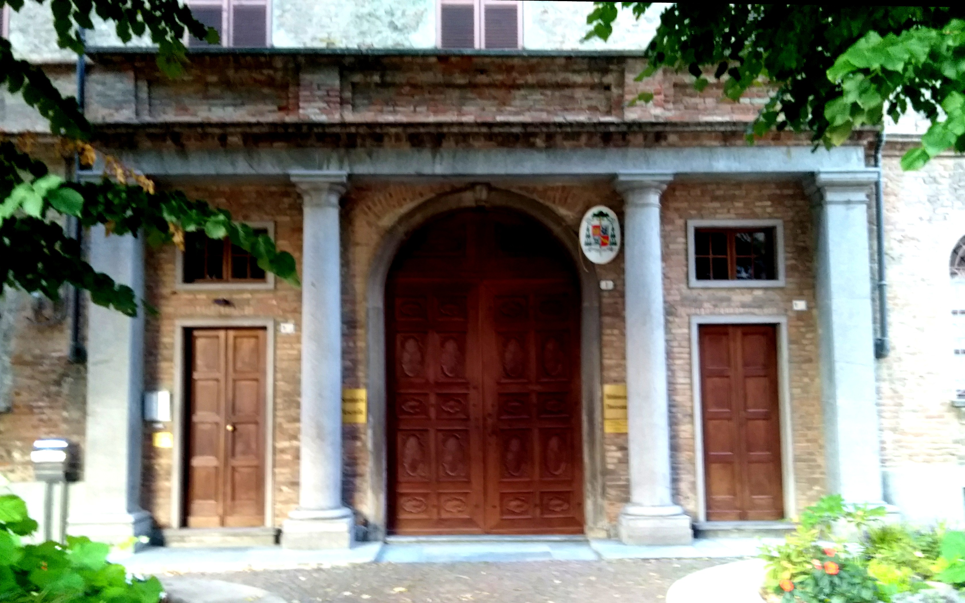 Seminario vescovile di Alba (CN)